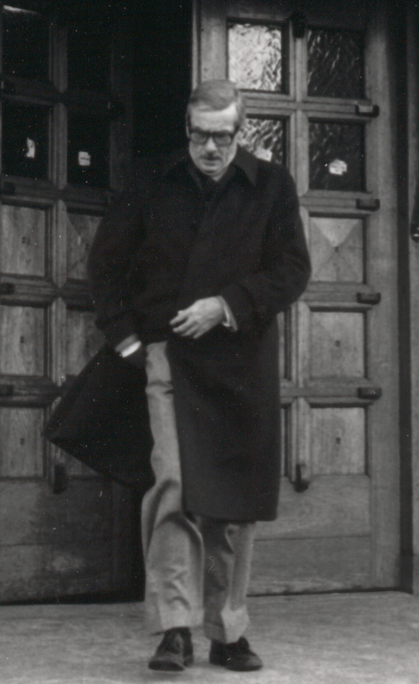 Eigen foto van Prof. Cools op het moment dat hij op 9 november 1979 de Aula van de Katholieke Universiteit te Nijmegen verlaat.